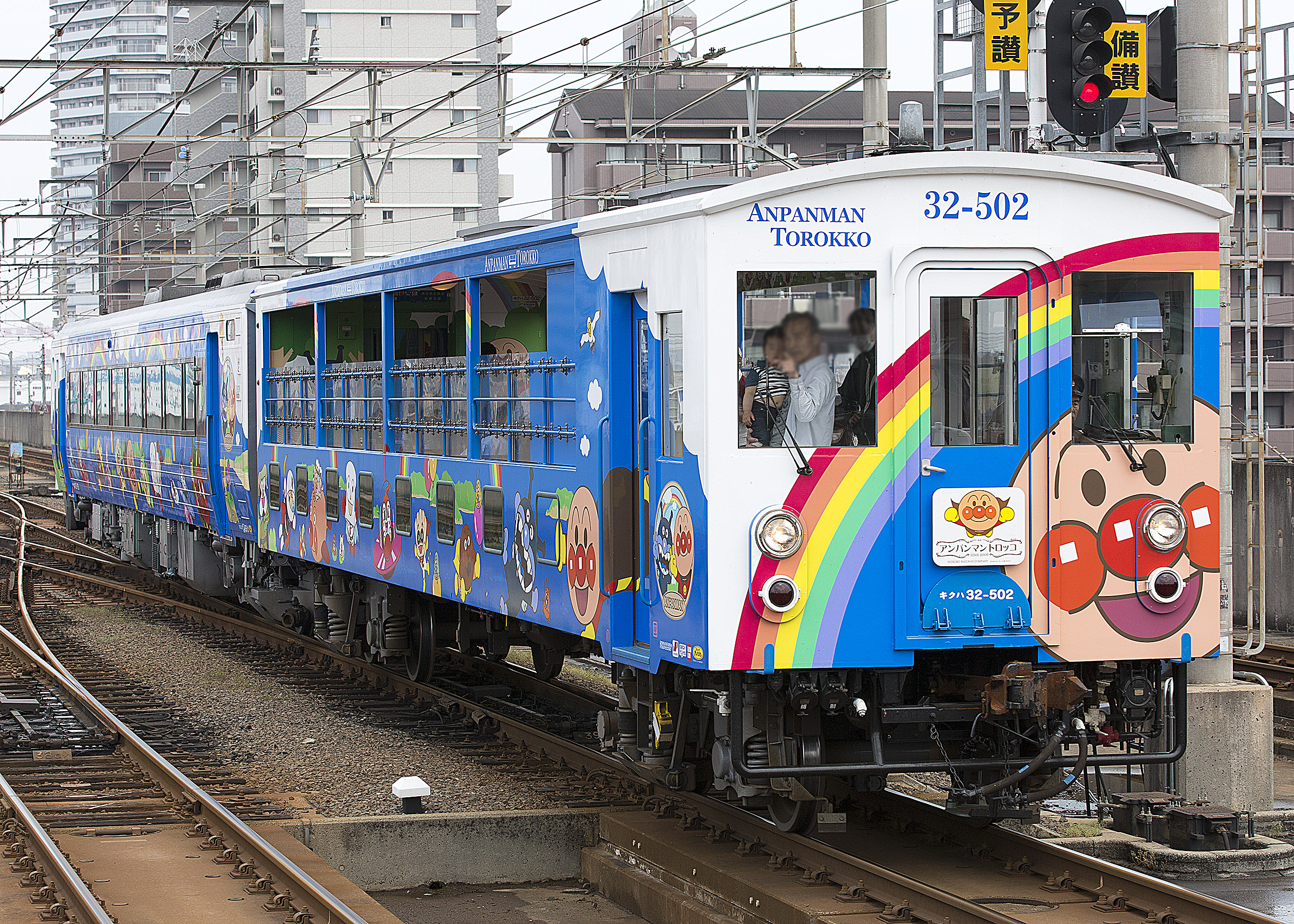 アンパンマントロッコ キクハ32-502+キロ185-26 宇多津駅にて